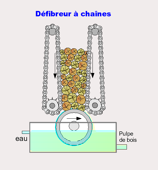 dessin perso libre de droit.